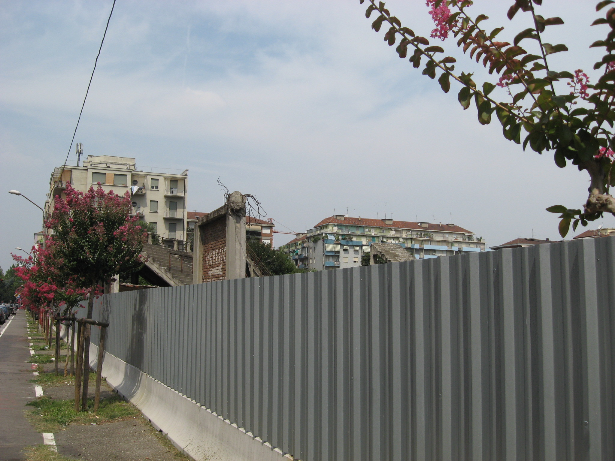 Old Filadelfia stadium in Turin